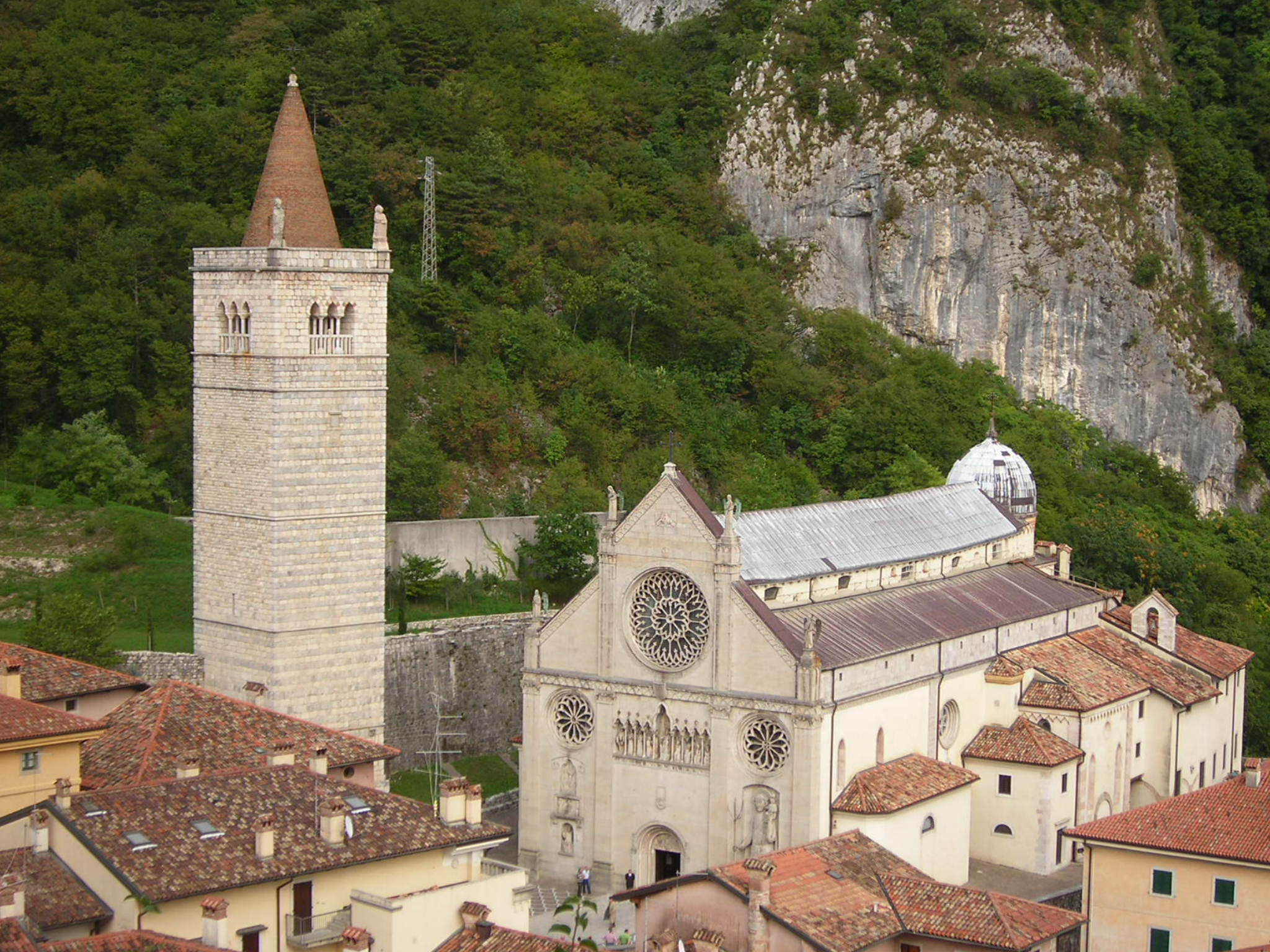 Duomo di Gemona del Friuli